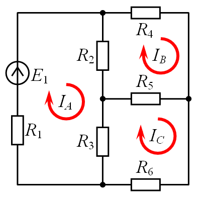 Если электрическую цепь можно представить в виде планарного (плоского без самопересечений) графа, то получившиеся замкнутые области образуют систему независимых контуров цепи. На рисунке выделена система из трёх контуров.